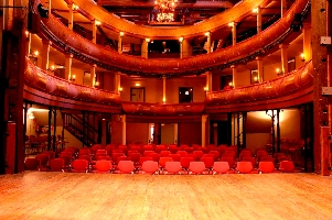 Interior Corral de Alcalá